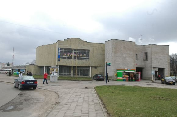 Senoji Klaipėdos autobusų stotis